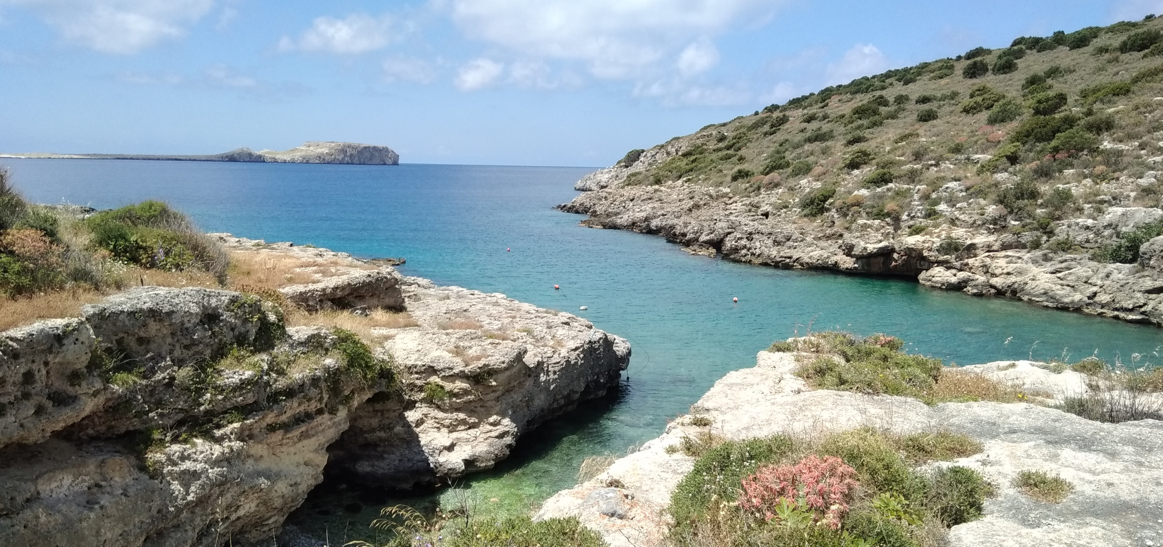 Vue du cap Tigani depuis Kato Mezapos